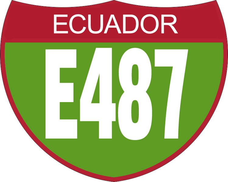 Disco de Identificación Ruta E487